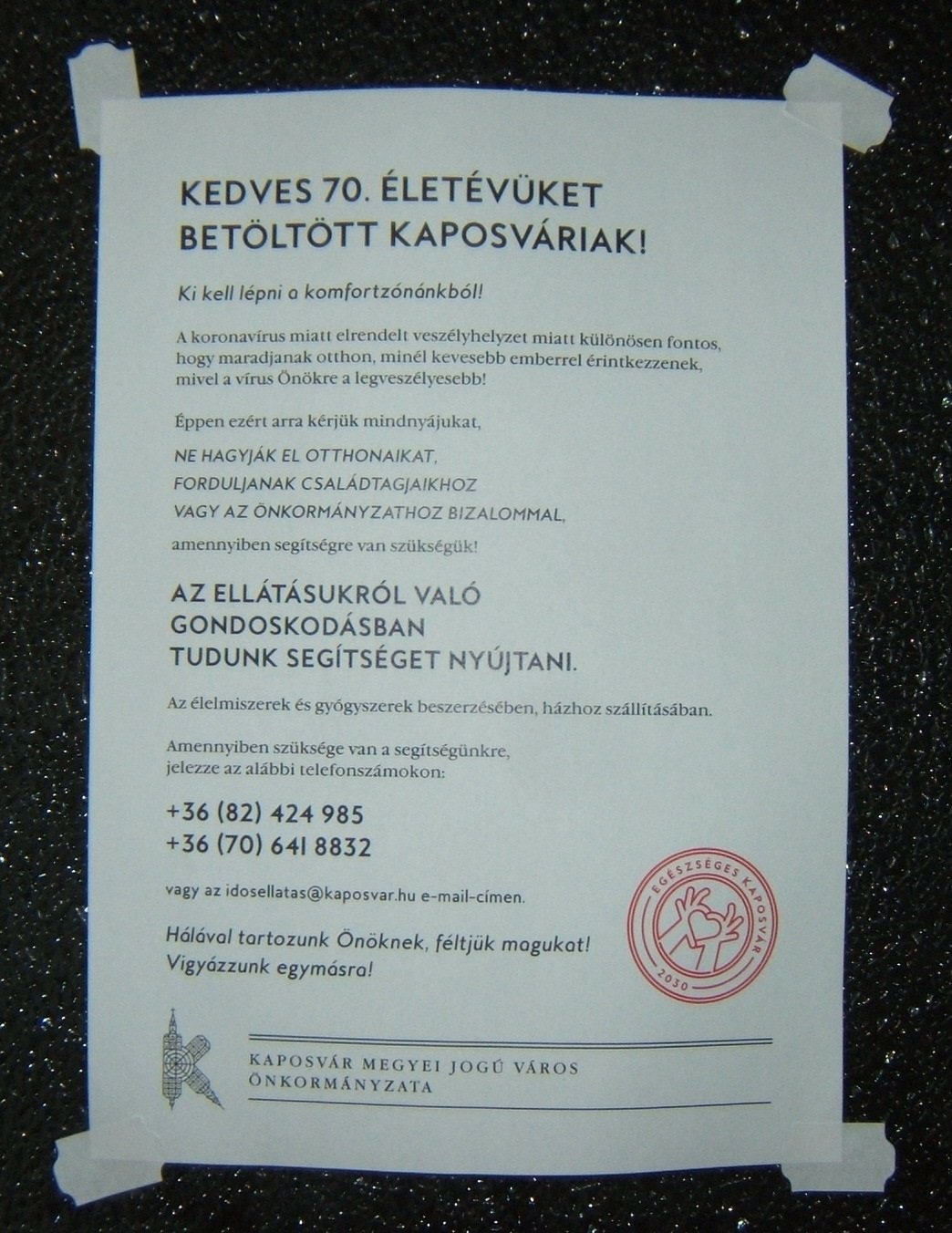 Kaposvár, felhívás az idősekhez a 2020-as koronavírus-járvány idején